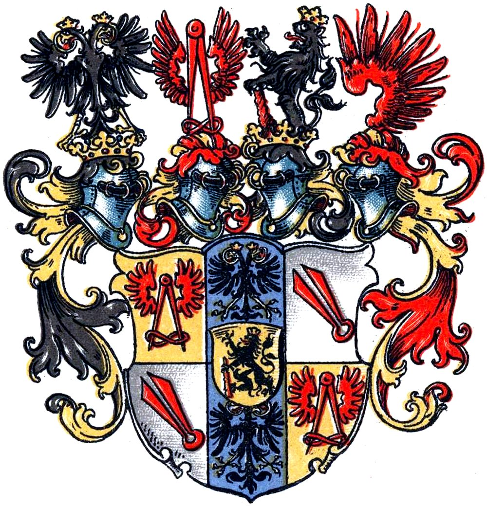 Wappen des deutschen Adelsgeschlechtes Milkau, Tafel 217 aus dem Wappenbuch des Westfälischen Adels (Buch 2)